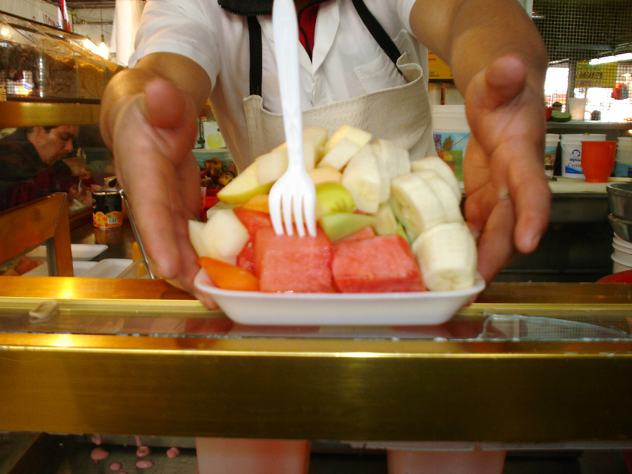 COCTEL DE FRUTAS EN UN MERCADO MEXICANO.